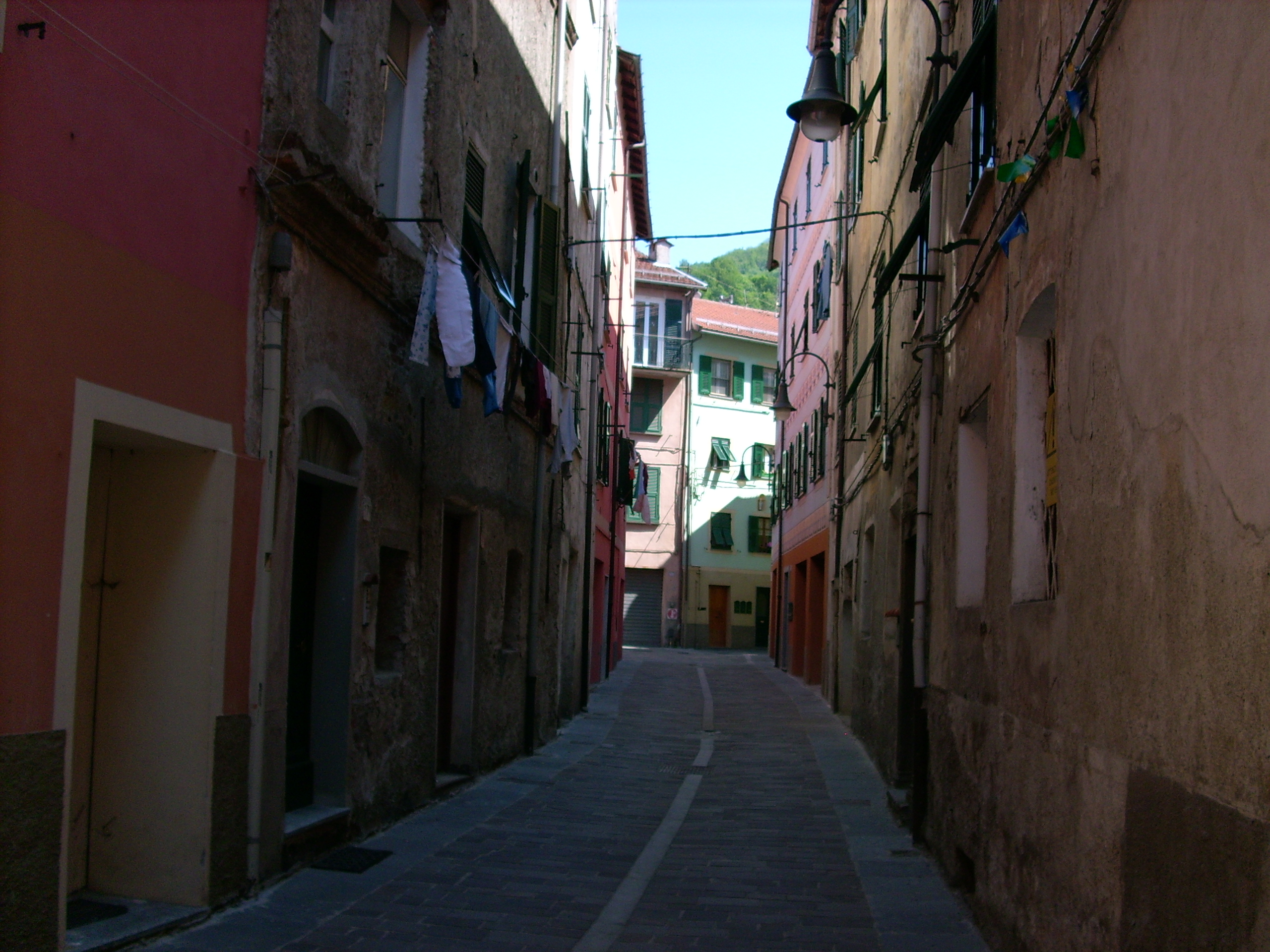 Centro storico di Rossiglione Superiore, Liguria, Italia